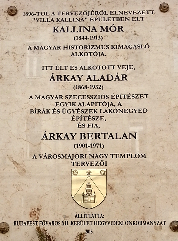 Kallina Mór, Árkay Aladár és Árkay Bertalan emléktáblája (2015) Budapest XII. kerületében (Városmajor utca 54.)